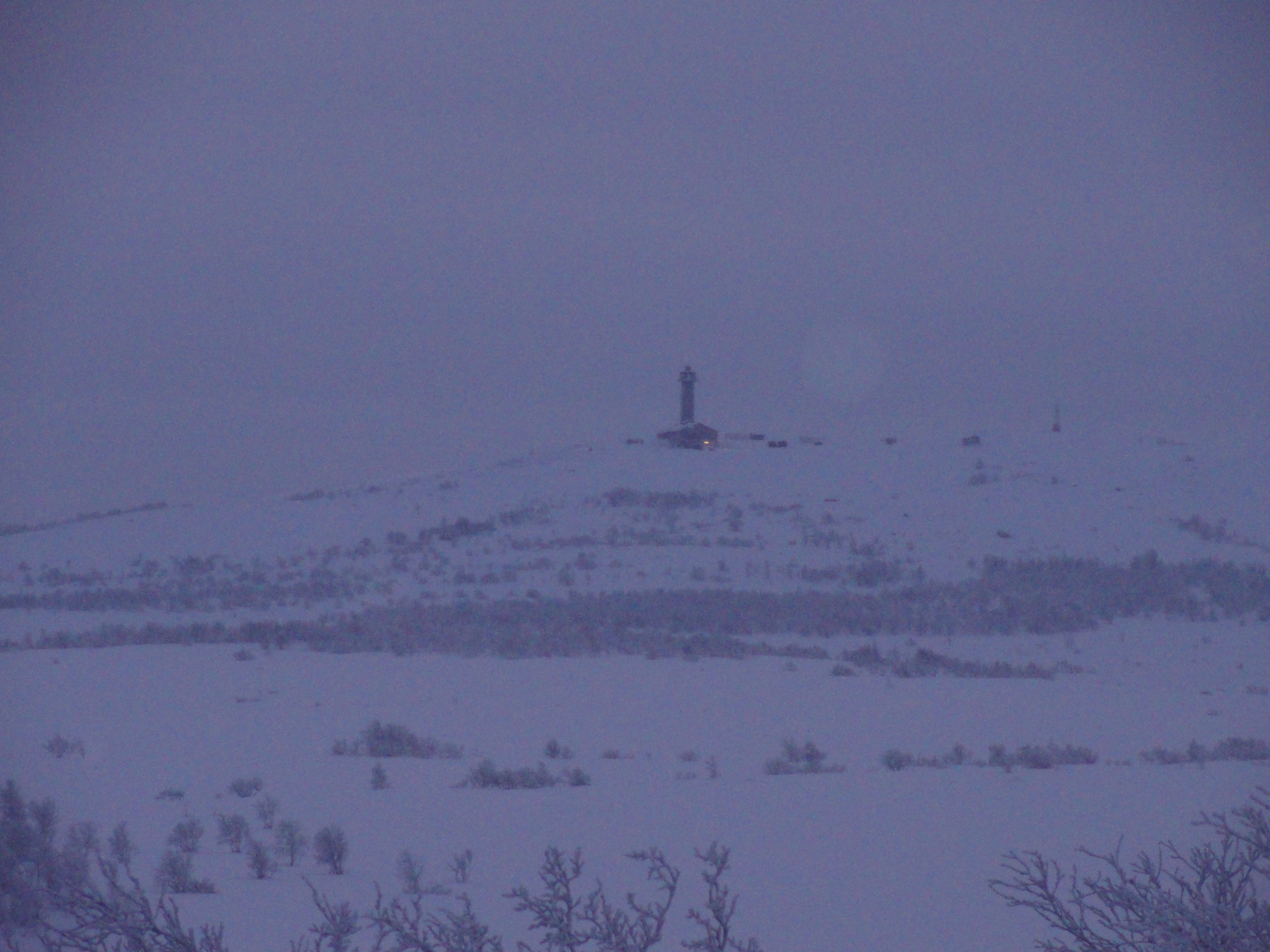 Korpfjell sett fra nord.